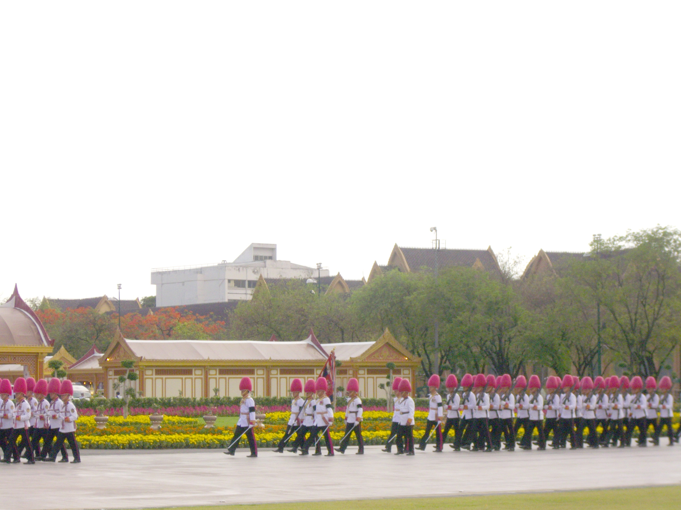 กองทหารเกียรติยศจากกองพันทหารราบที่ 3 กรมทหารราบที่ 1 มหาดเล็กรักษาพระองค์ ในพระบาทสมเด็จพระมงกุฎเกล้าเจ้าอยู่หัว เคลื่อนขบวนเข้าสู่พระเมรุ ในการพระราชพิธีพระราชทานเพลิงพระศพ สมเด็จพระเจ้าภคินีเธอ เจ้าฟ้าเพชรรัตนราชสุดา สิริโสภาพัณณวดี ณ พระเมรุท้องสนามหลวง วันที่ 9 เมษายน พ.ศ. 2555